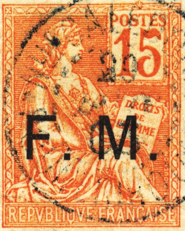 Timbre type Mouchon, surchargé FM (Franchise militaire), 15 c.